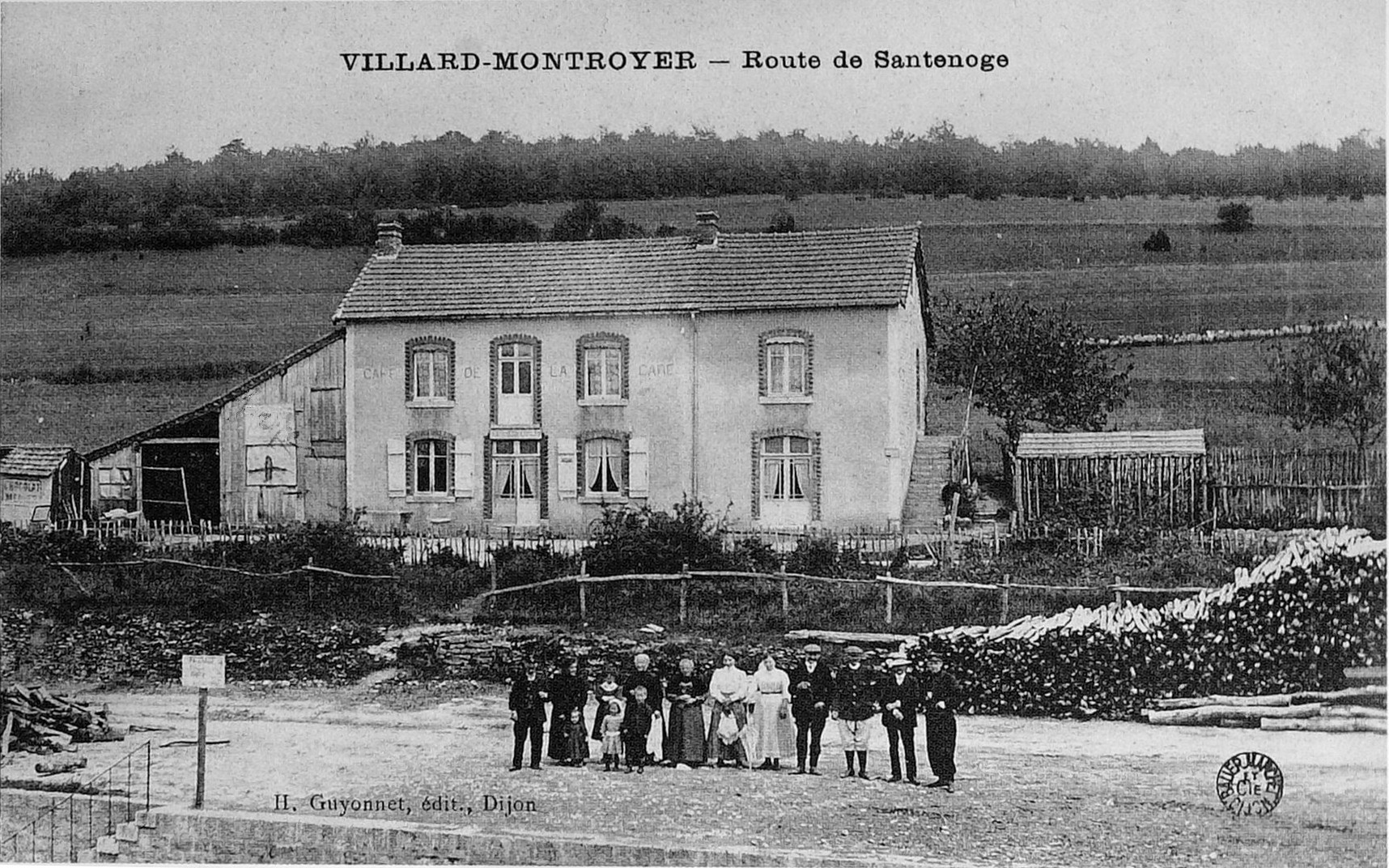 sur une vue ancienne.